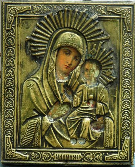 Феодоровская церковь — В начале 1930-х годов храм был закрыт и около 1935 г. уничтожен вместе с кладбищем. Первая Литургия в храме-палатке была отслужена 19 января 2007 г. Впоследствии церковная община инициировала раскопки фундамента храма. Раскопали алтарь святителя Климента Римского и алтарь с "пещерой Гроба Господня". Точная копия Кувуклии (Гроба Господня) дала этому храму название "Киевский Иерусалим".